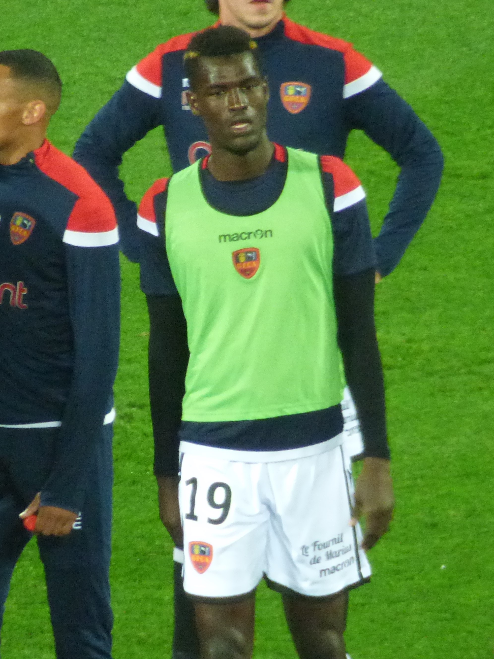 Ousseynou Ba avant le match RC Lens / GFC Ajaccio, comptant pour la onzième journée du championnat de France de Ligue 2 2018-2019 au Stade Bollaert-Delelis, le 22 octobre 2018.